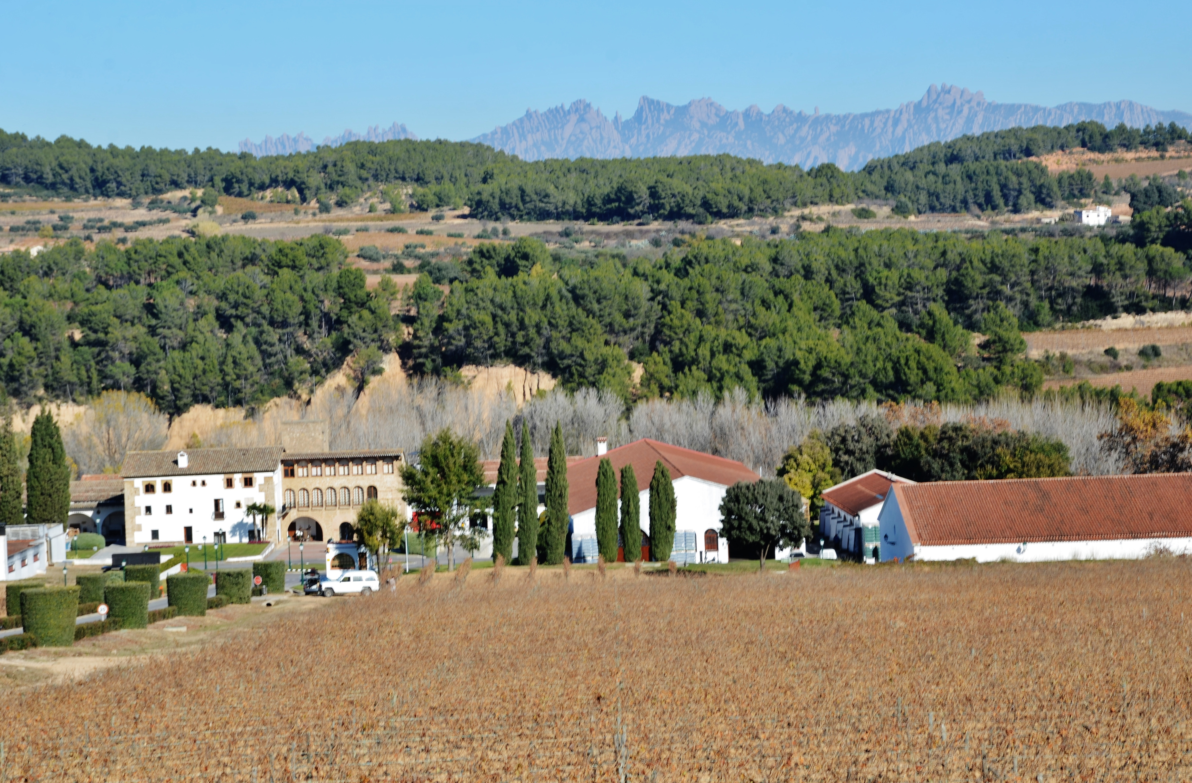 Heretat Segura Viudes, o Ca l'Esbert, torrelavit, Alt Penedès